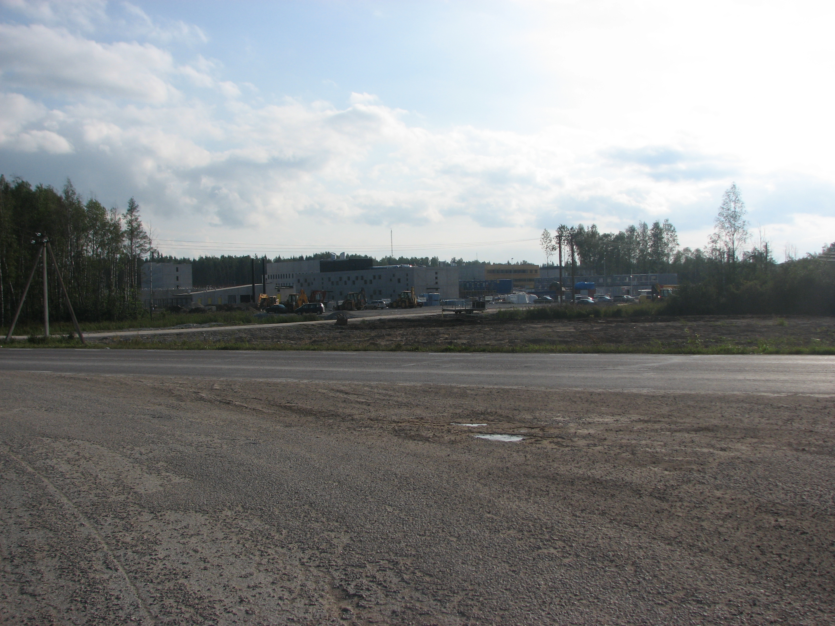 Viru vangla ehitamine